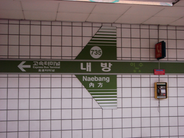 ソウル地下鉄7号線内方駅 駅名標